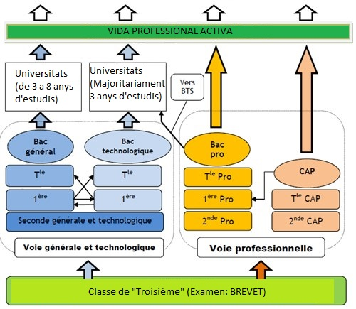 Organització del "Lycée"